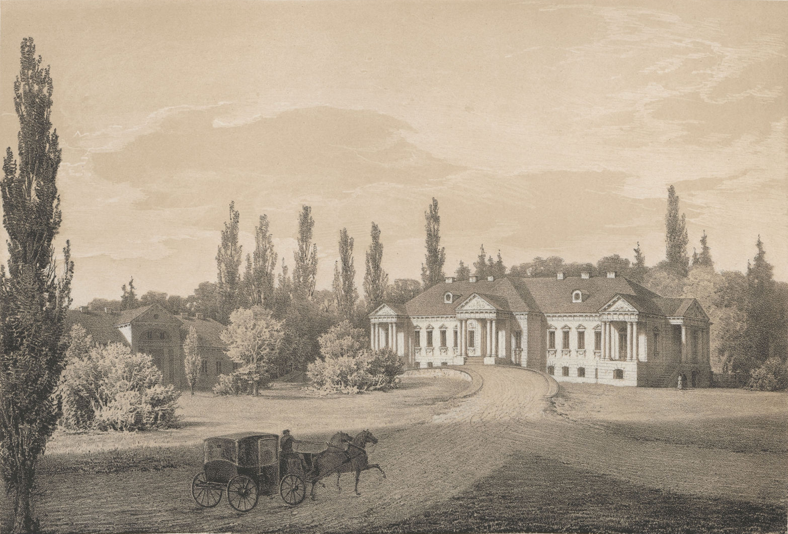 Беларуская (тарашкевіца): Моладаў (Moładaŭ), сядзіба Скірмунтаў (Skirmunt)